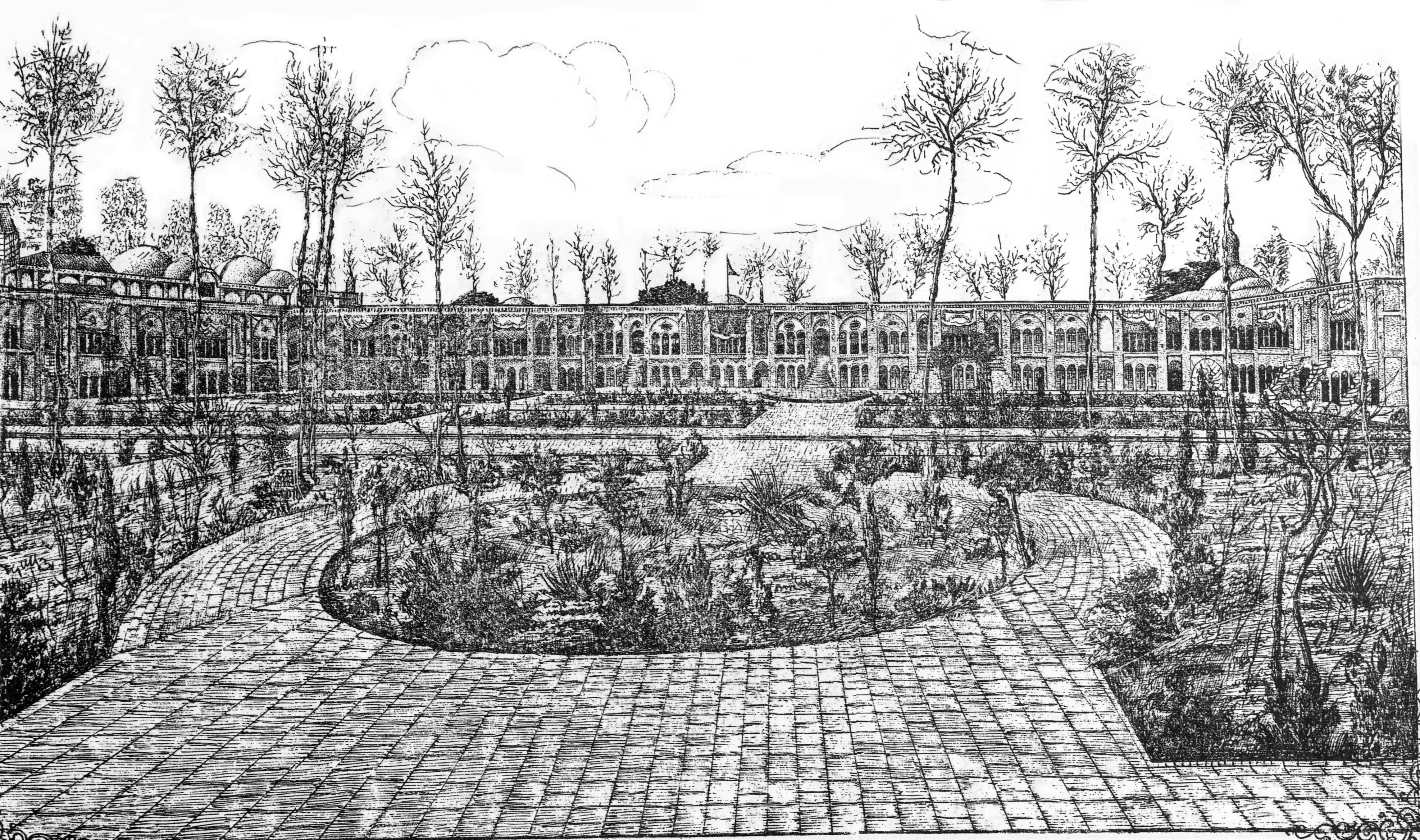 در زیر نگاره نوشته شده بود: عمارت حرمخانه مبارکه جدیدالبناء